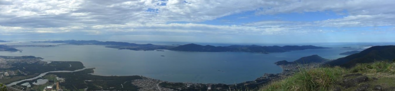 Floripa desde o cume do Cambirela